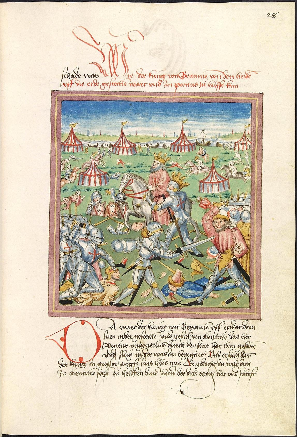 Codex Palatinus germanicus 142, Blatt 28r - Pontus und Sidonia - Pontus hilft dem König von Britannien im Schlachtgetümmel